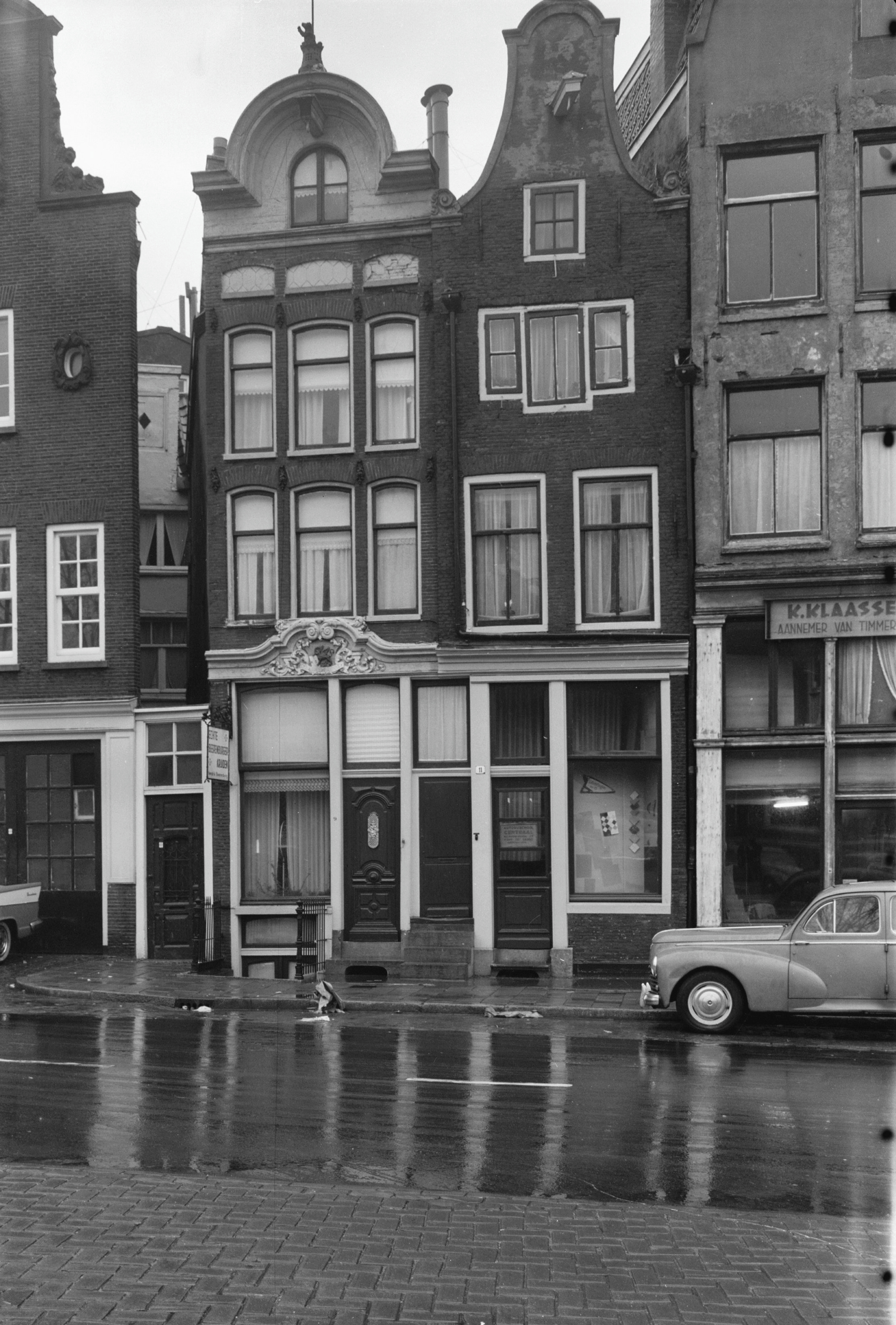 gevel